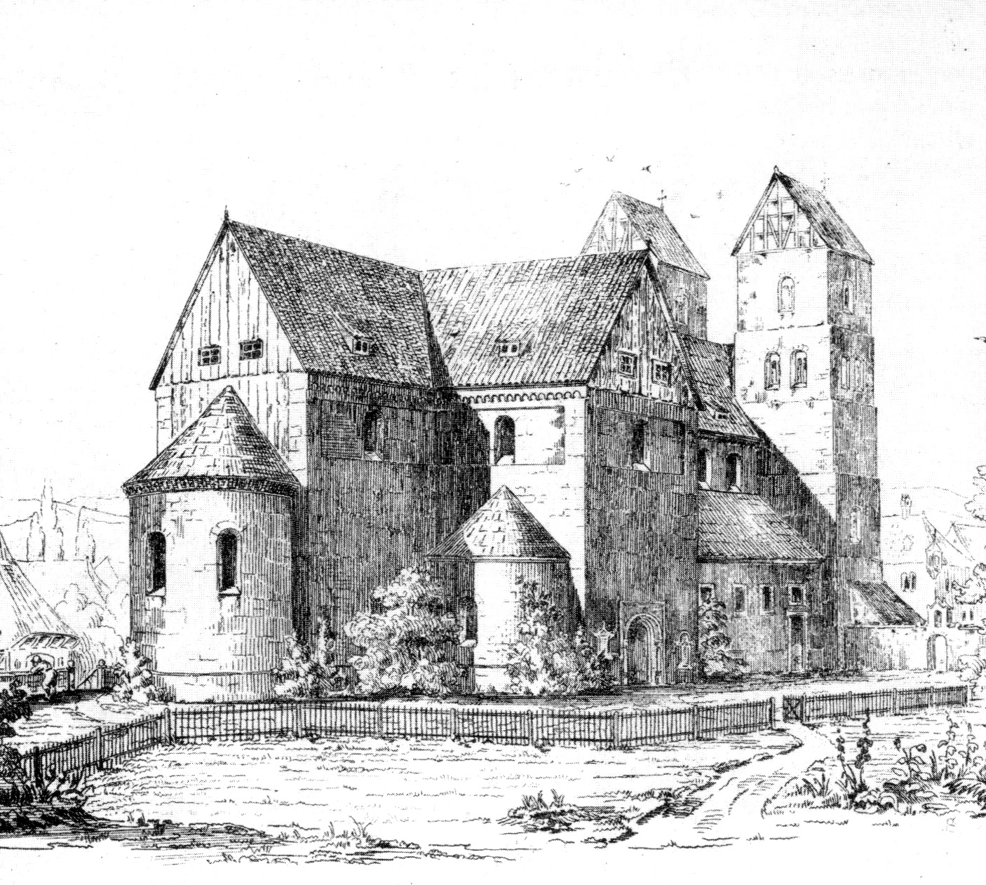 Klosterkirche St. Blasius, Fredelsloh, Nordostansicht